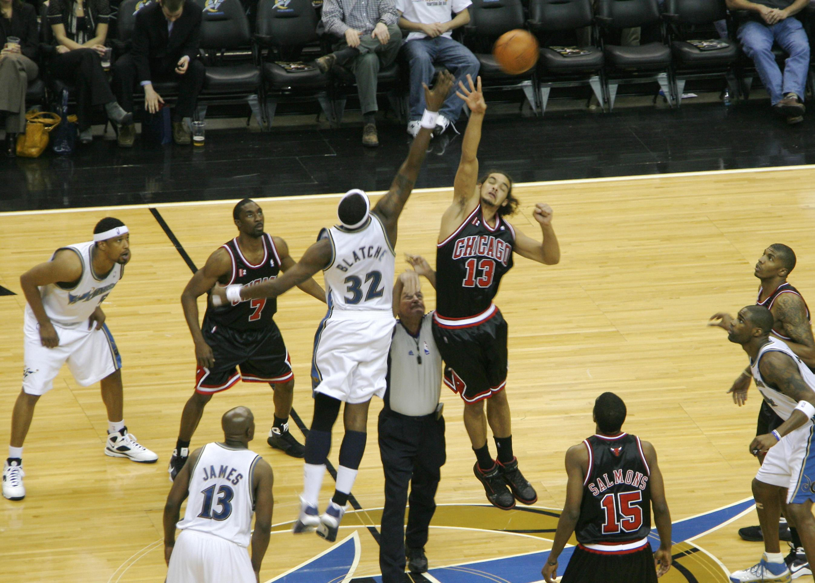 Joakim Noah match NBA Washington Wizards - Chicago Bulls